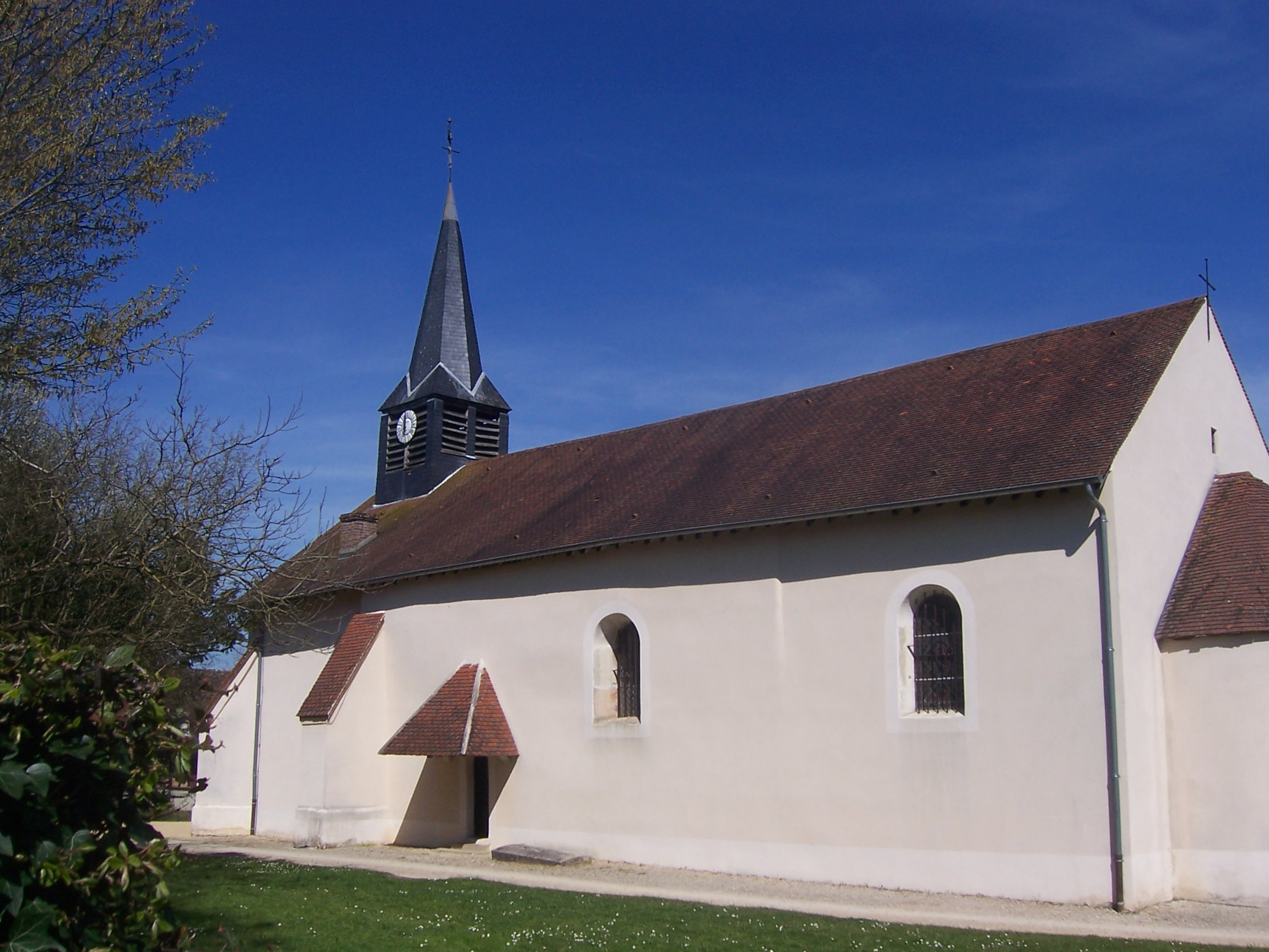 Eglise de Thurey